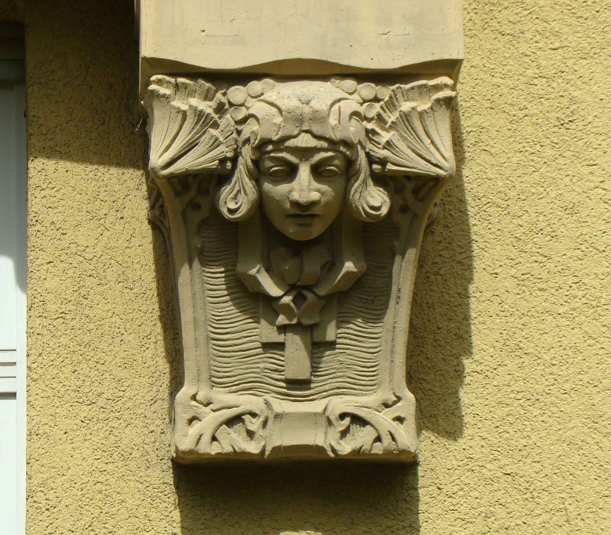 Fassadendetail der Villa Wolf in Heilbronn-Sontheim